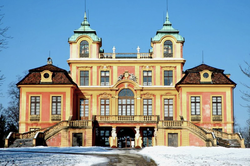 Schloß Favorite - Lust- und Jagdhaus (1716-1719)